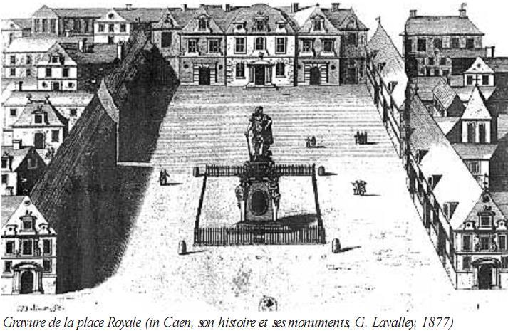 caen_place_republique_gravure